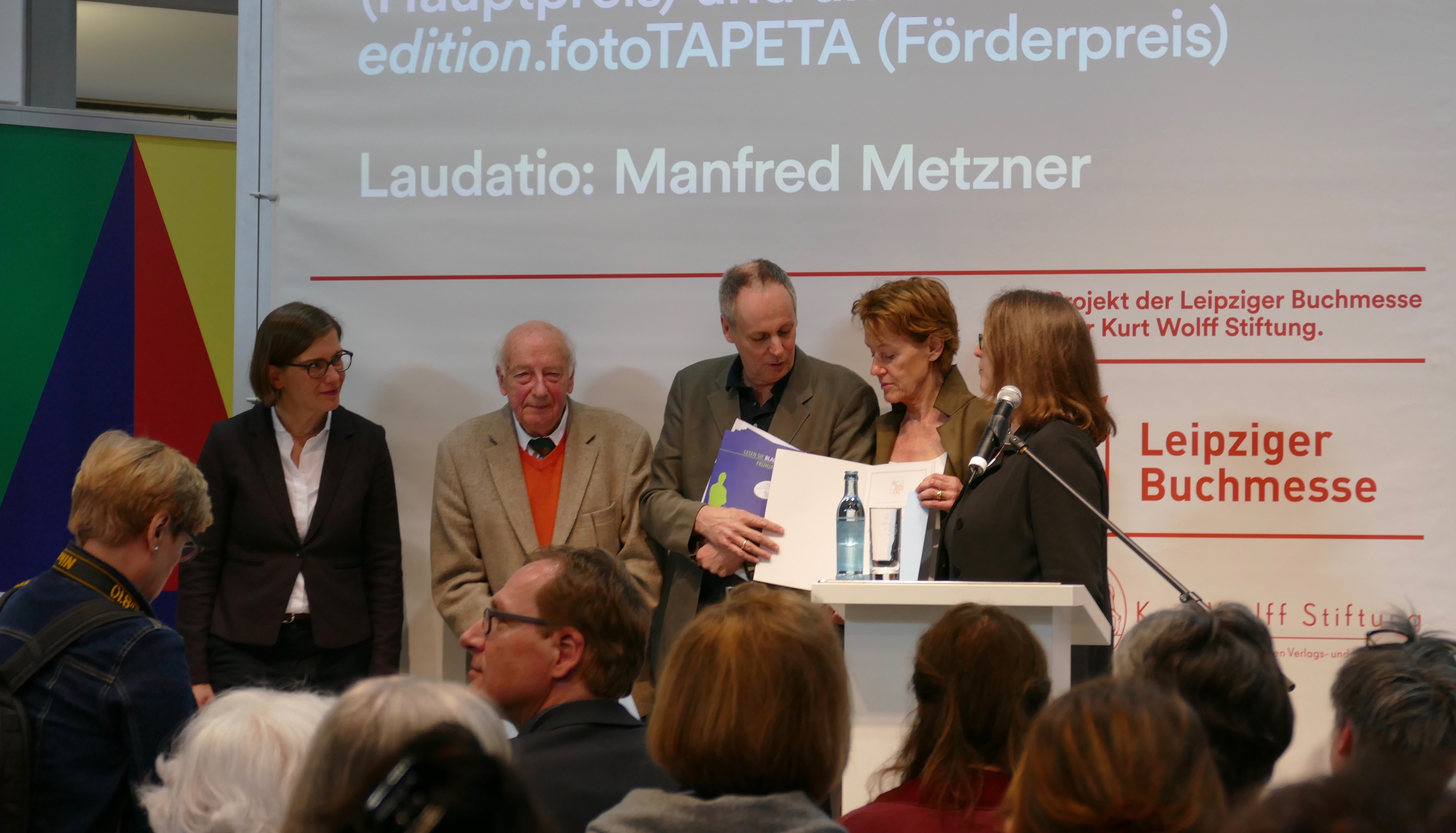 Verleihung des Förderpreises der Kurt Wolff-Stiftung an Andreas Rostek, Verleger der edition foto.Tapeta (v.l.n.r. Skadi Jennicke, Andreas J. Meyer, Andreas Rostek, NN, Britta Jürgs)